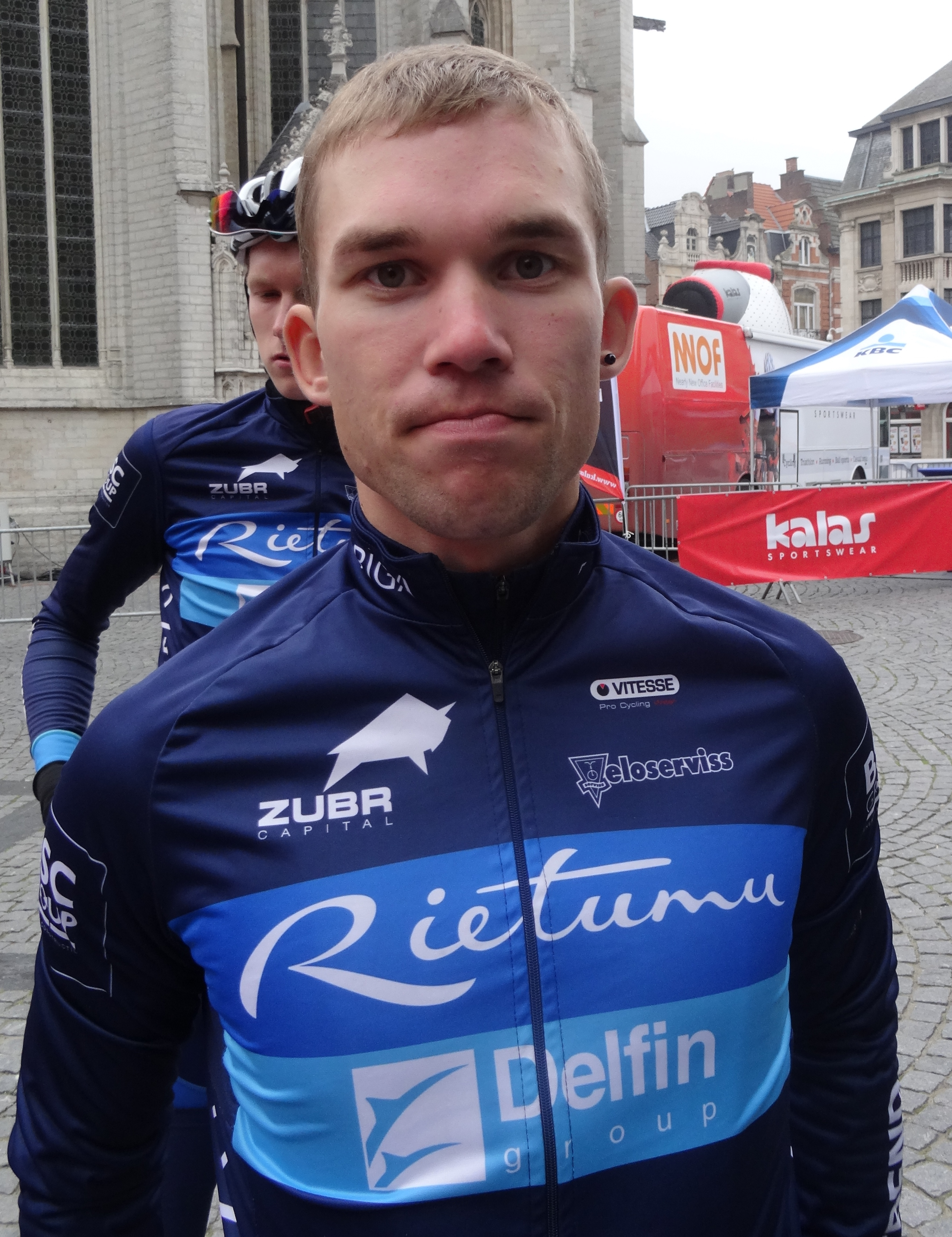 Reportage photographique réalisé le dimanche 14 septembre à l'occasion du départ et de l'arrivée du Grand Prix Jef Scherens 2014 à Louvain, Belgique.